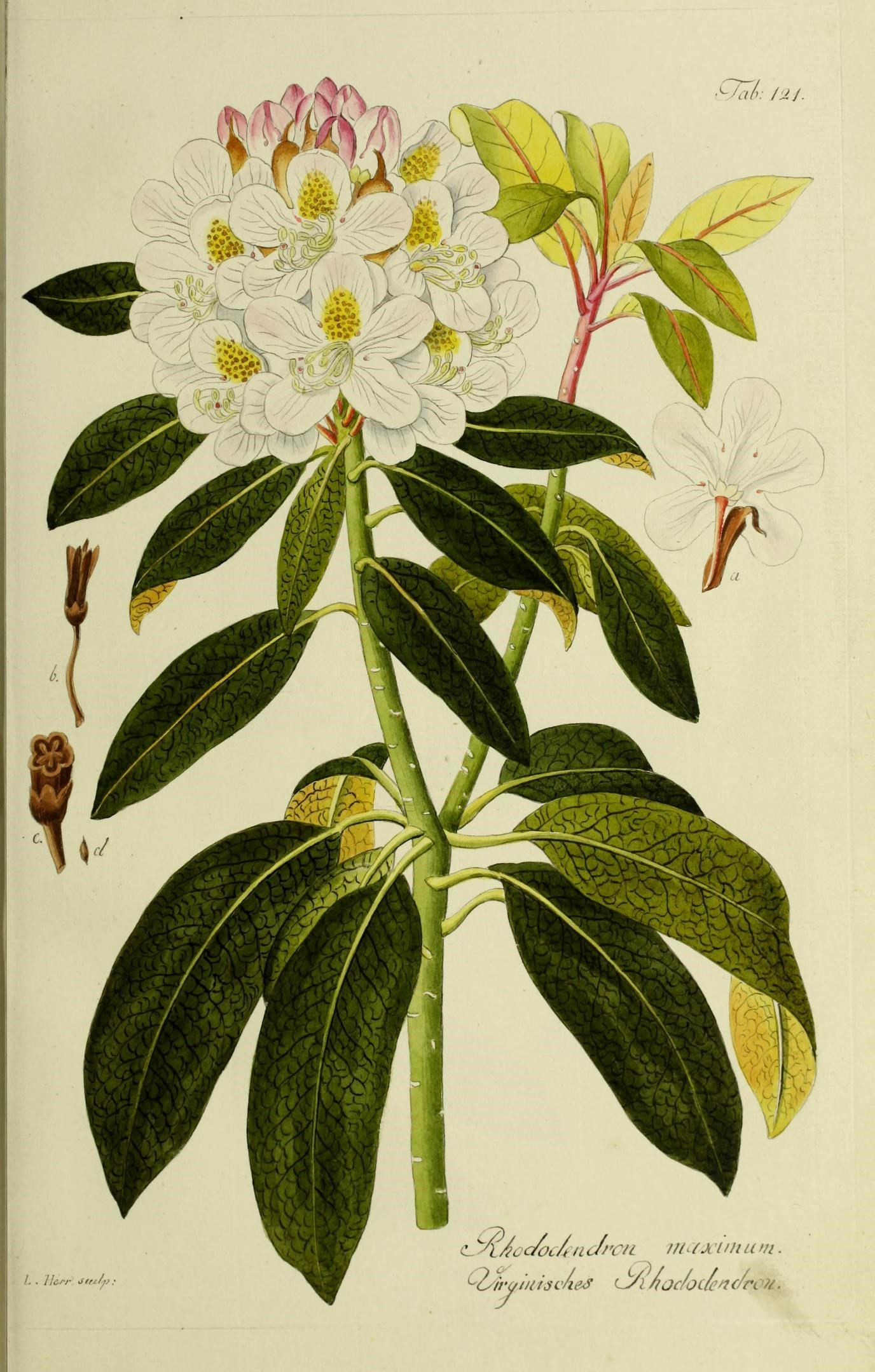 Österreichs allgemeine baumzucht, : oder Abbildungen in- und ausländischer Bäume und Sträuche, deren Anpflanzung in Österreich möglich und nützlich ist /